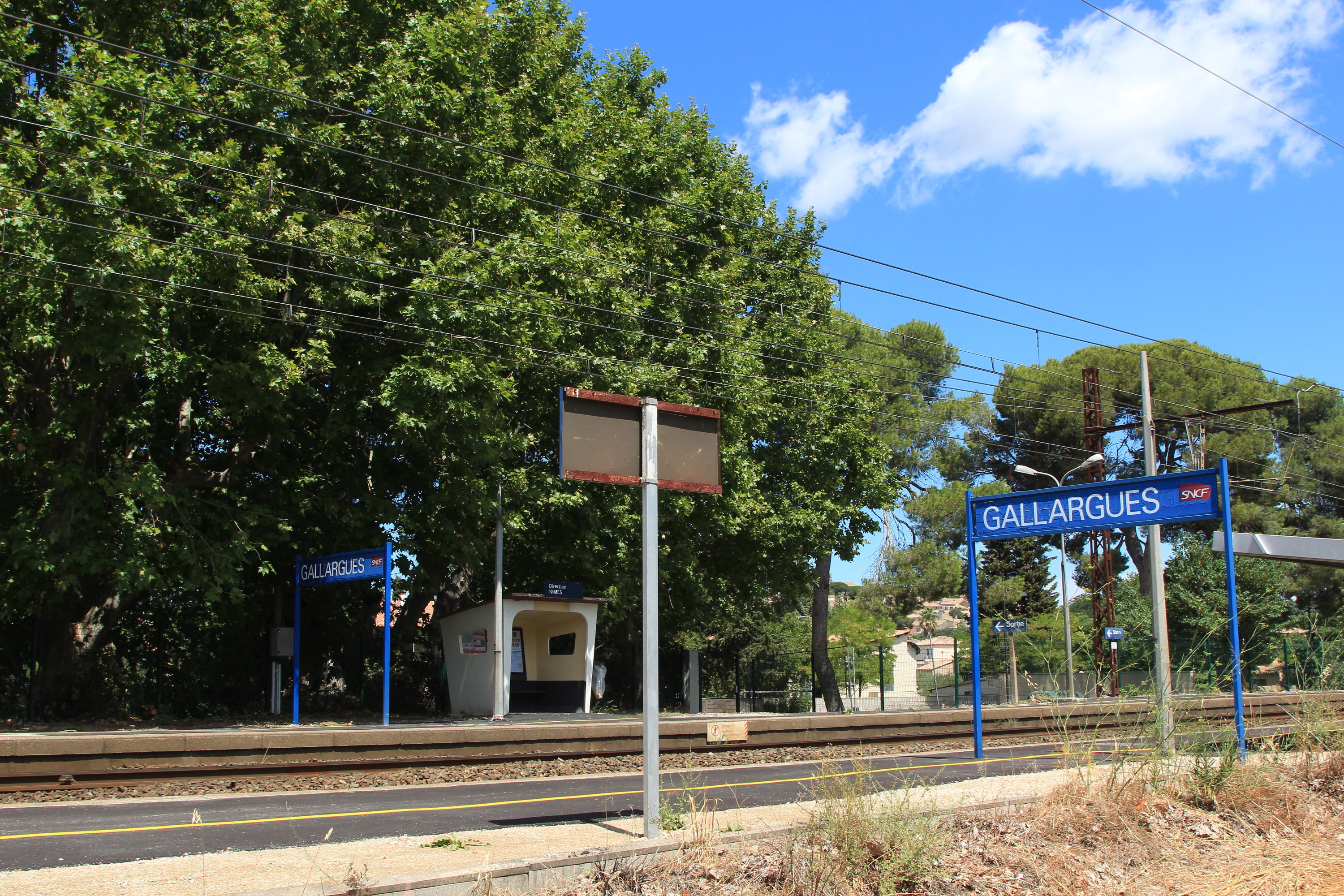 Vue des voies et abri de quai de la gare de Gallargues.